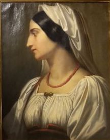 Italienische Frau von Josef Anton Fischer